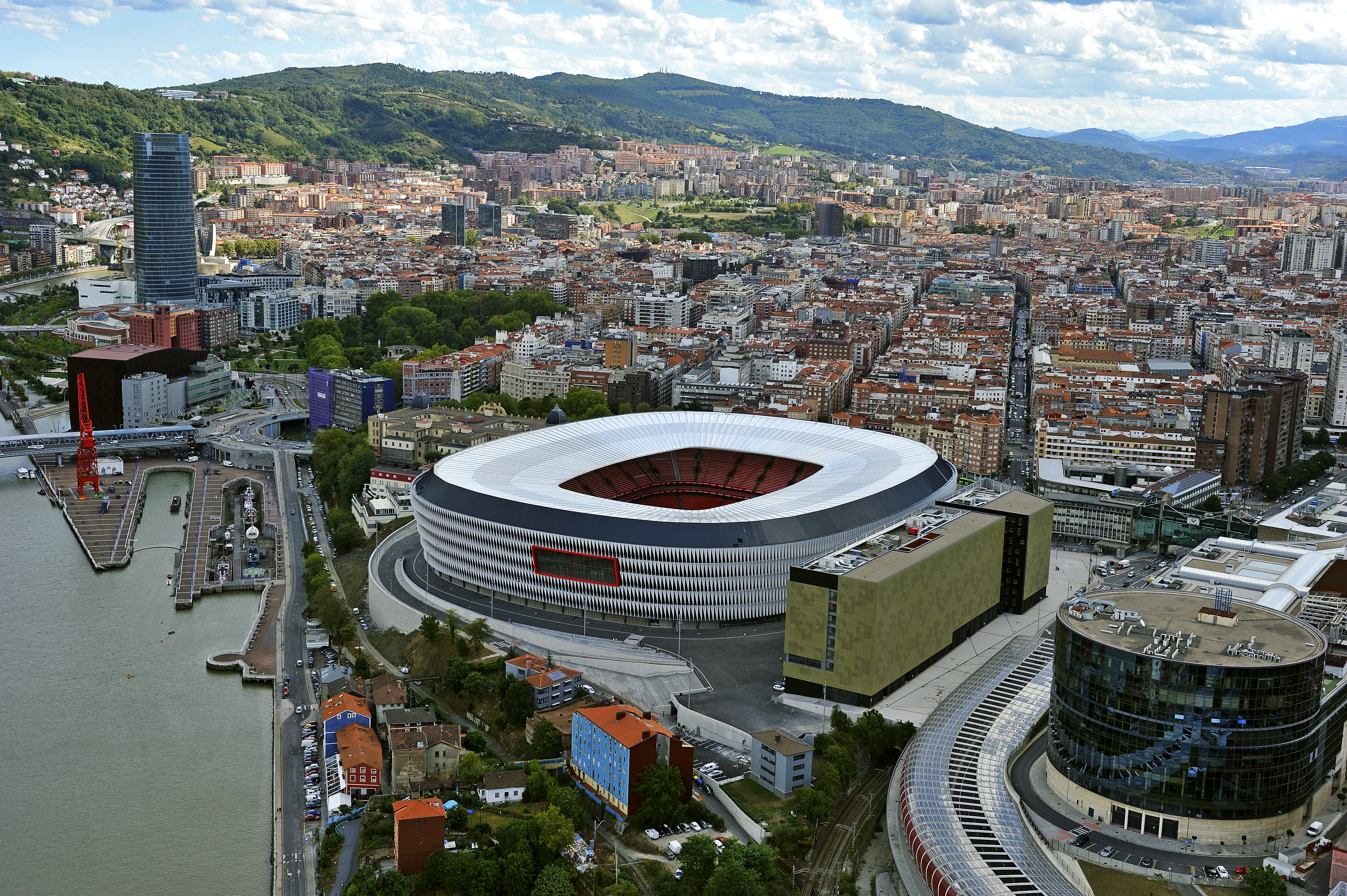 Estadio de San Mamés (2013)San Mamés es un estadio de fútbol ubicado en la villa de Bilbao (País Vasco, España).El campo tiene una capacidad de 53 289 localidades (ampliable en 2000 más, según el arquitecto César Azcárate), y cuenta con el rango de estadio de Categoría 4.El estadio ha sido construido para conservar y mejorar la actual atmósfera de sonido envolvente producida por los cánticos de los aficionados locales. Exteriormente es un estadio de fútbol. Como resultado de la condición del Gobierno Vasco para su entrada en la sociedad San Mamés Barria, y por tanto en la aportación económica, se acordó que en los sótanos del estadio se ubiquen además las siguientes instalaciones ocupando un total de 5434 m². Estas instalaciones no afectan al proyecto general del estadio, apenas suponen un ligero aumento del coste y exteriormente no son apreciables.3Módulo de atletismo subterráneo de 112 metros de largo por 12 de ancho: pista de 60 metros lisos e instalaciones para la práctica de salto de altura, triple salto, salto de longitud, salto con pértiga y lanzamiento de peso.Centro de innovación deportiva.Centro de medicina deportiva.Polideportivo municipal con piscina, gimnasio, fitness, spa